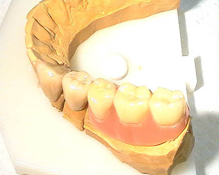 Freiendprothese, Zahnprothese